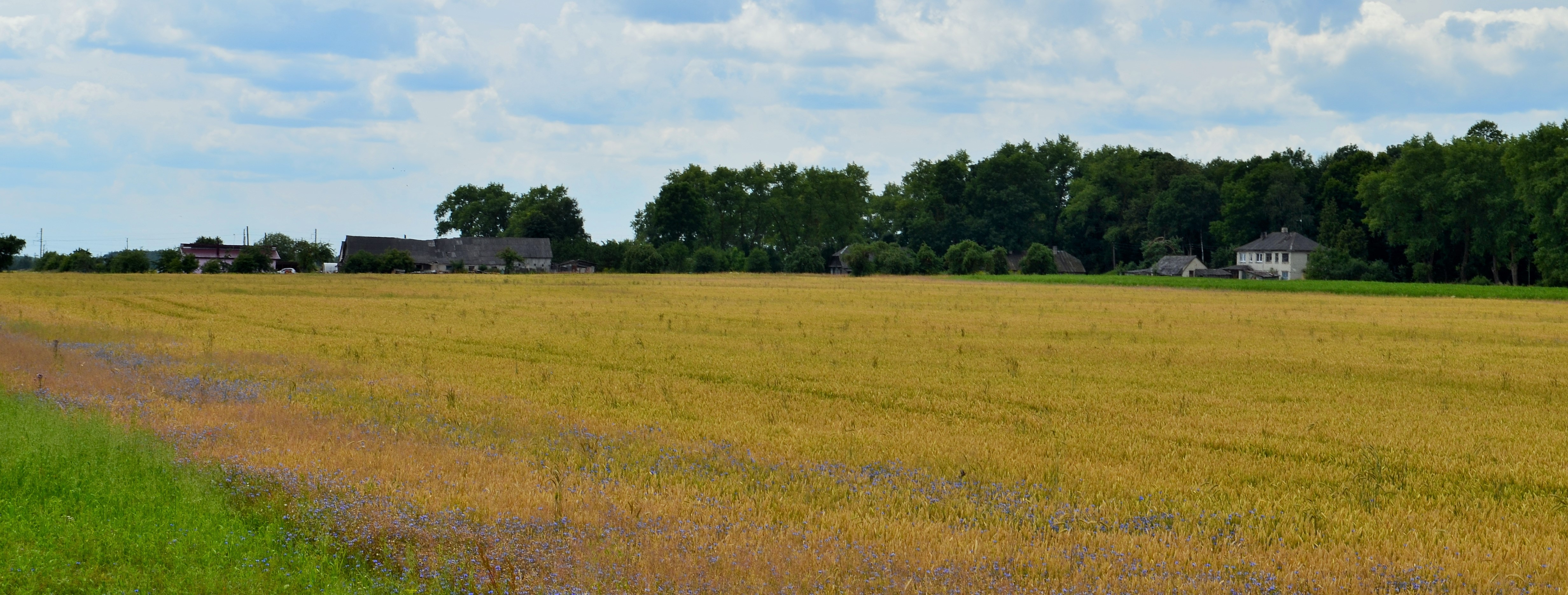 Šemetiškiai, Ukmergės raj.